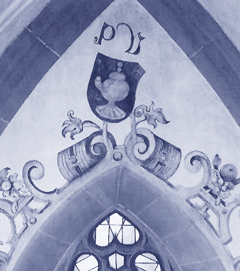 Wappen von Philipp Volland in der Markgröninger Spitalkirche